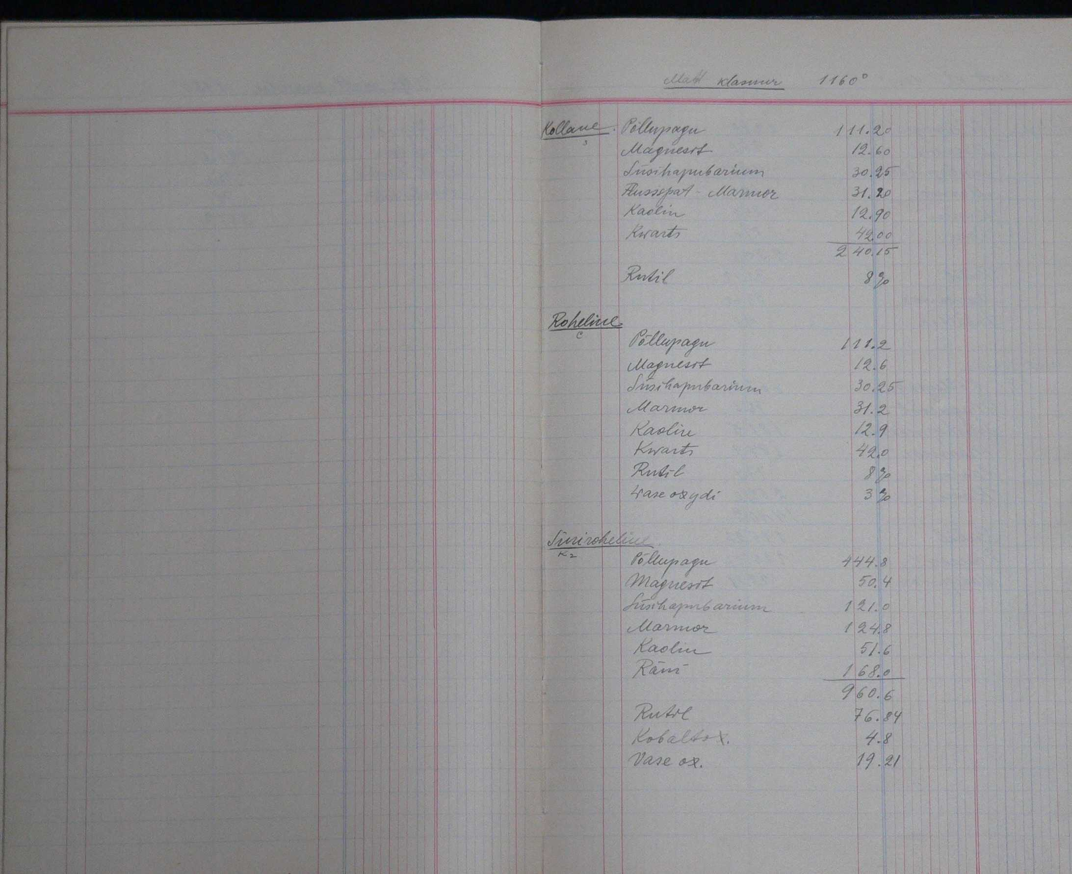 Arvo Elleri foto Valli ühest glasuuriretseptidega leheküljest